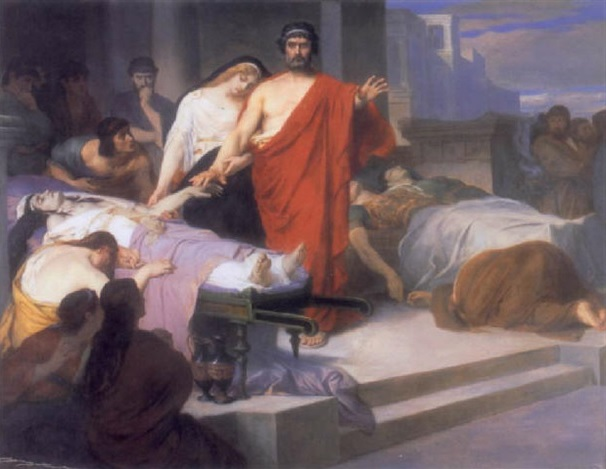 Oscar-Pierre Mathieu, Oedipe auprès des cadavres de sa femme et de ses fils, 1871, collection particulière